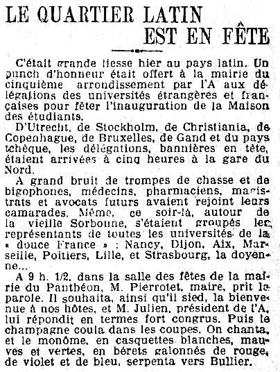 Récit de la fête d'inauguration de la Maison des étudiants à Paris, le 22 janvier 1910, avec trompes de chasse, bigophones et délégations étrangères étudiantes.